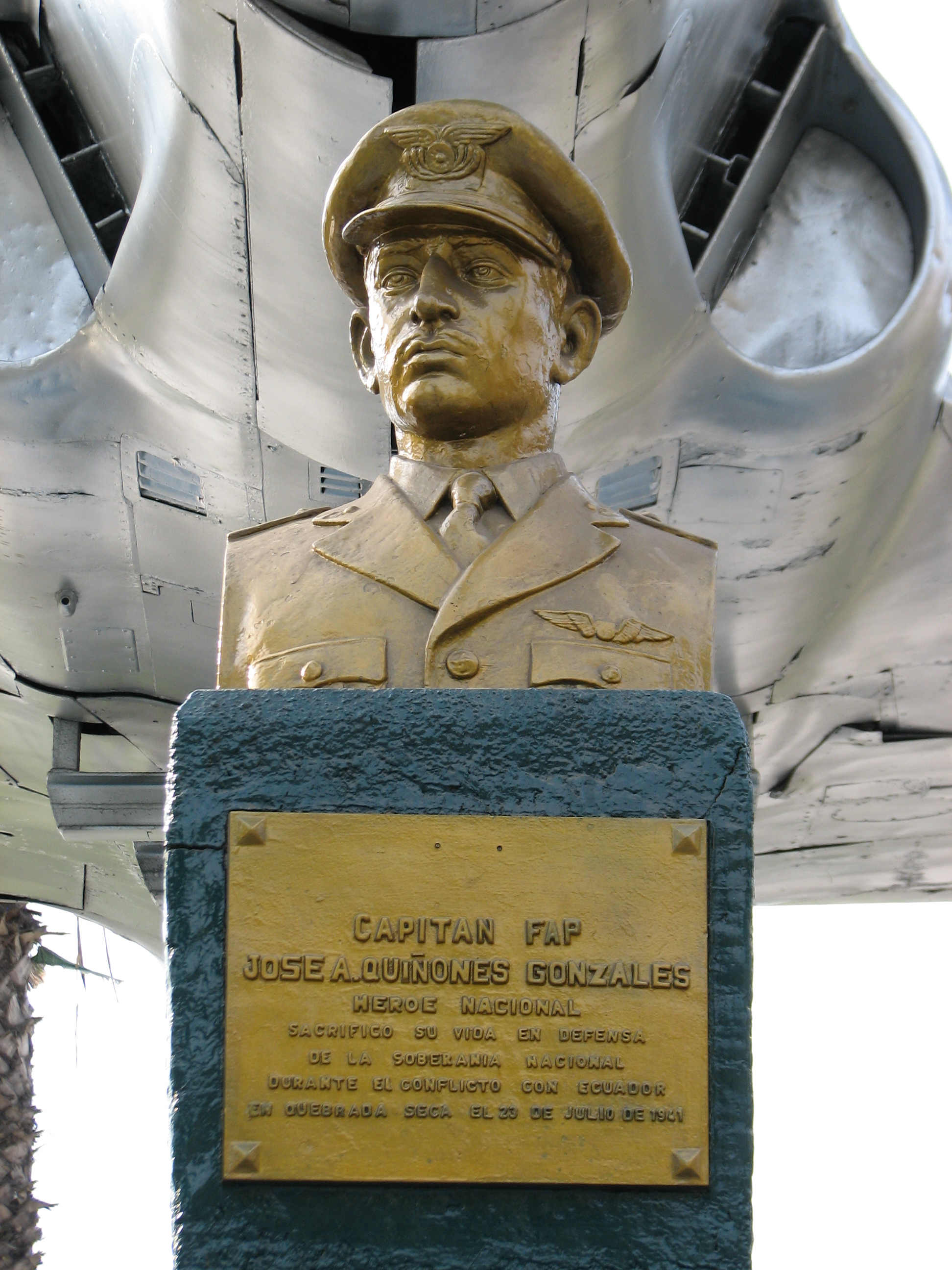 Statue of José Abelardo Quiñones Gonzáles in Parque del Avión Rímac/Lima.jpg